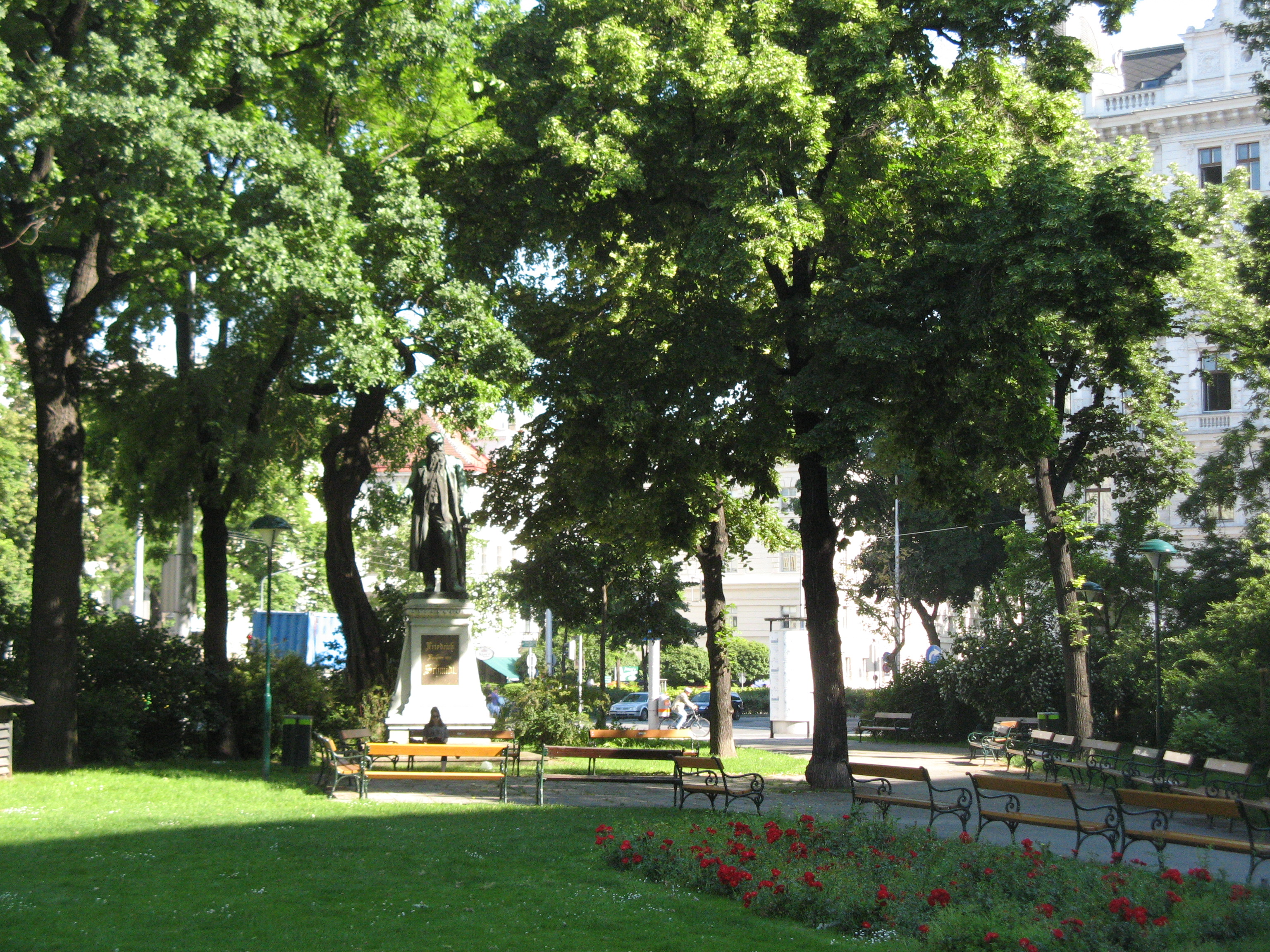 Friedrich-Schmidt-Platz, Wien-Innere Stadt